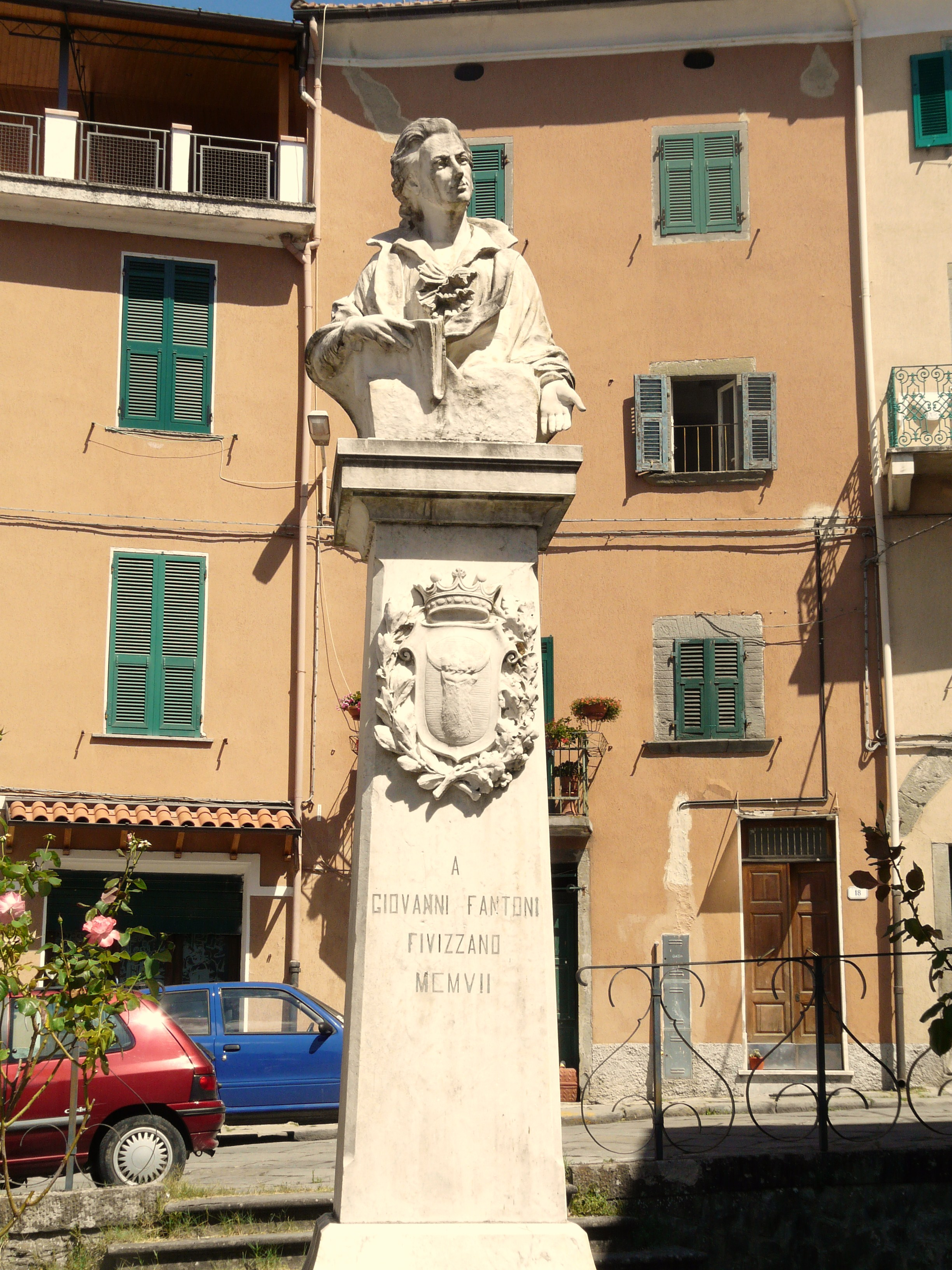 Monumento al poeta Giovanni Fantoni, Fivizzano, Toscana, Italia